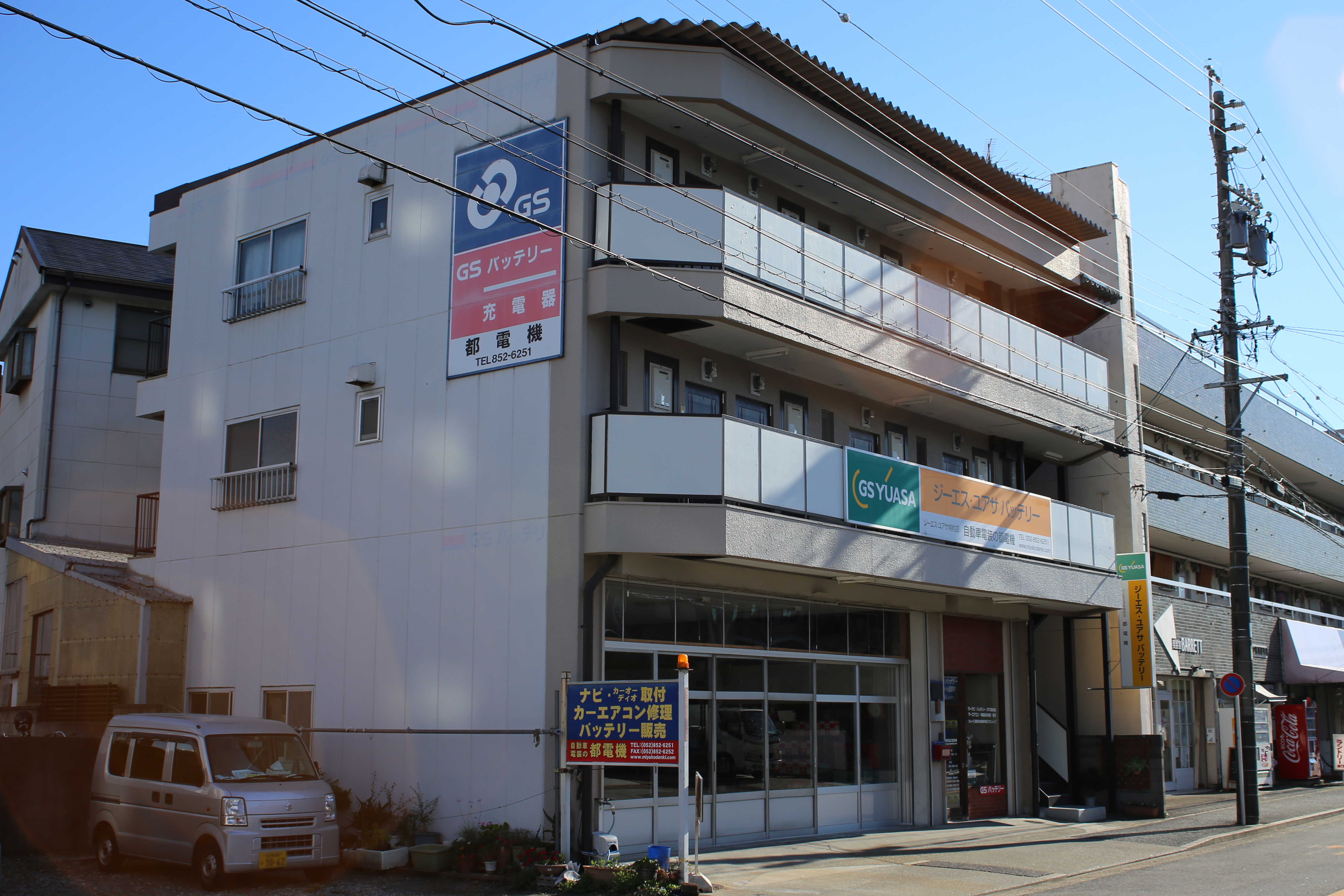 名古屋市昭和区の都電機本社を北側公道東側より撮影。ただし、トリミングおよび、ナンバープレートにつき画像処理済。